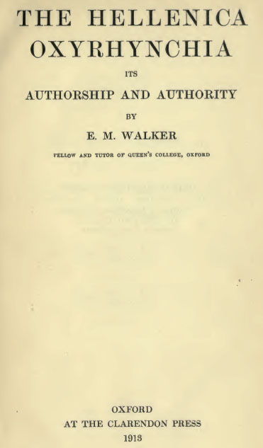 Титульный лист книги: Уолкер Е. Оксиринхская греческая история, ее вторство и значение. Оксфорд, 1913.